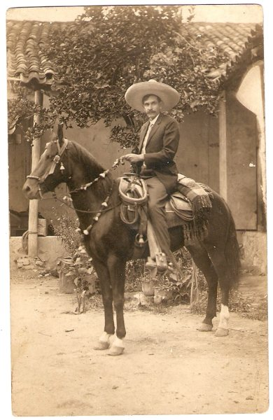 Imagen de Trinidad Paniagua, montado a caballo.